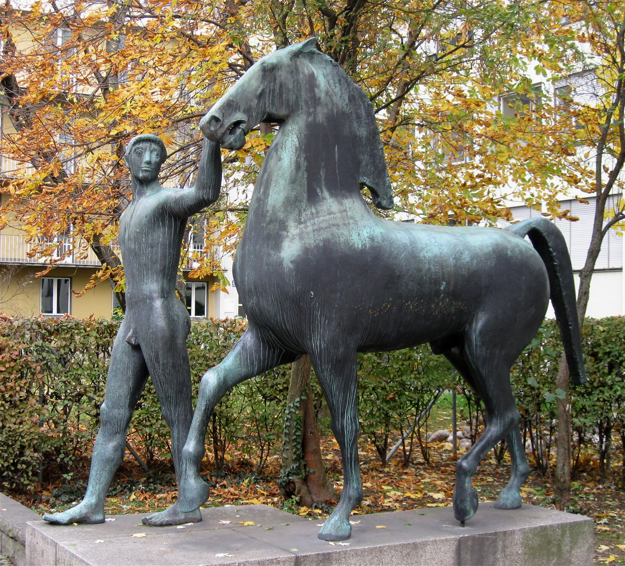 Franz Mikorey: Rosselenker, Goethestr. in München